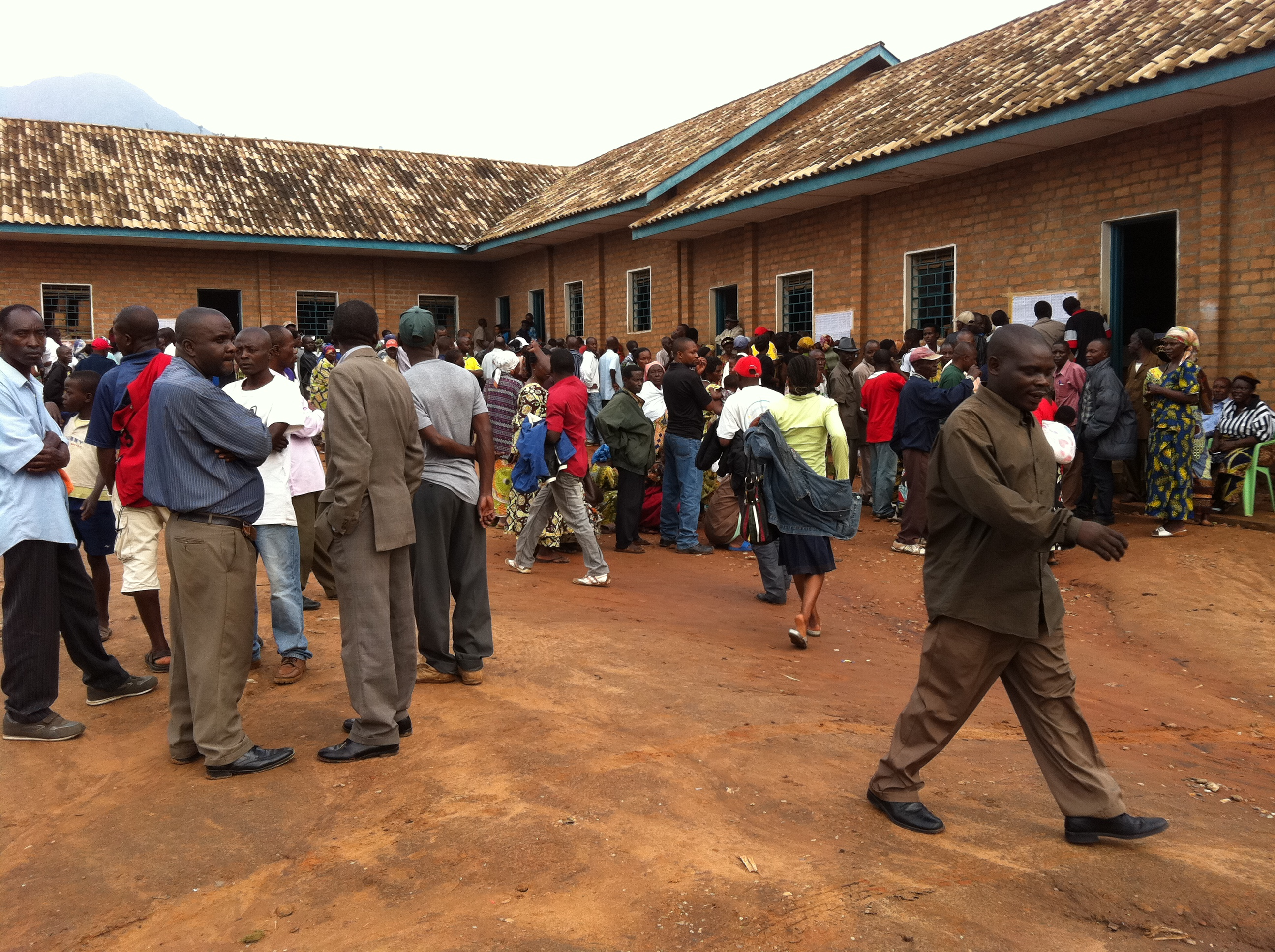 File d'attente à l'ouverture au Centre de vote de Mulongwe